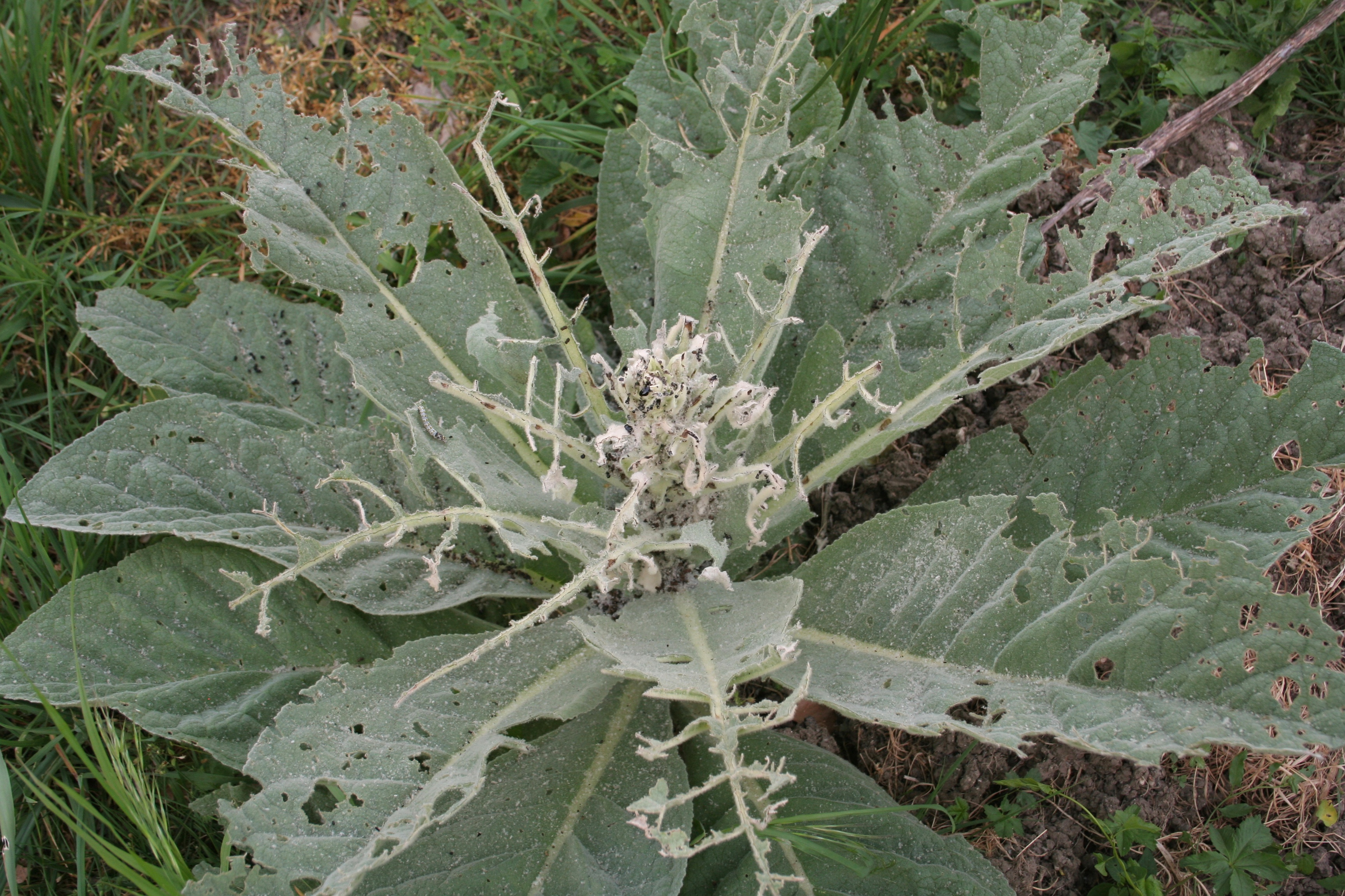 rosette de Verbascum thapsus attaquée par des chenilles de Cucullia verbasci. Vantoux et Longevelle, France.